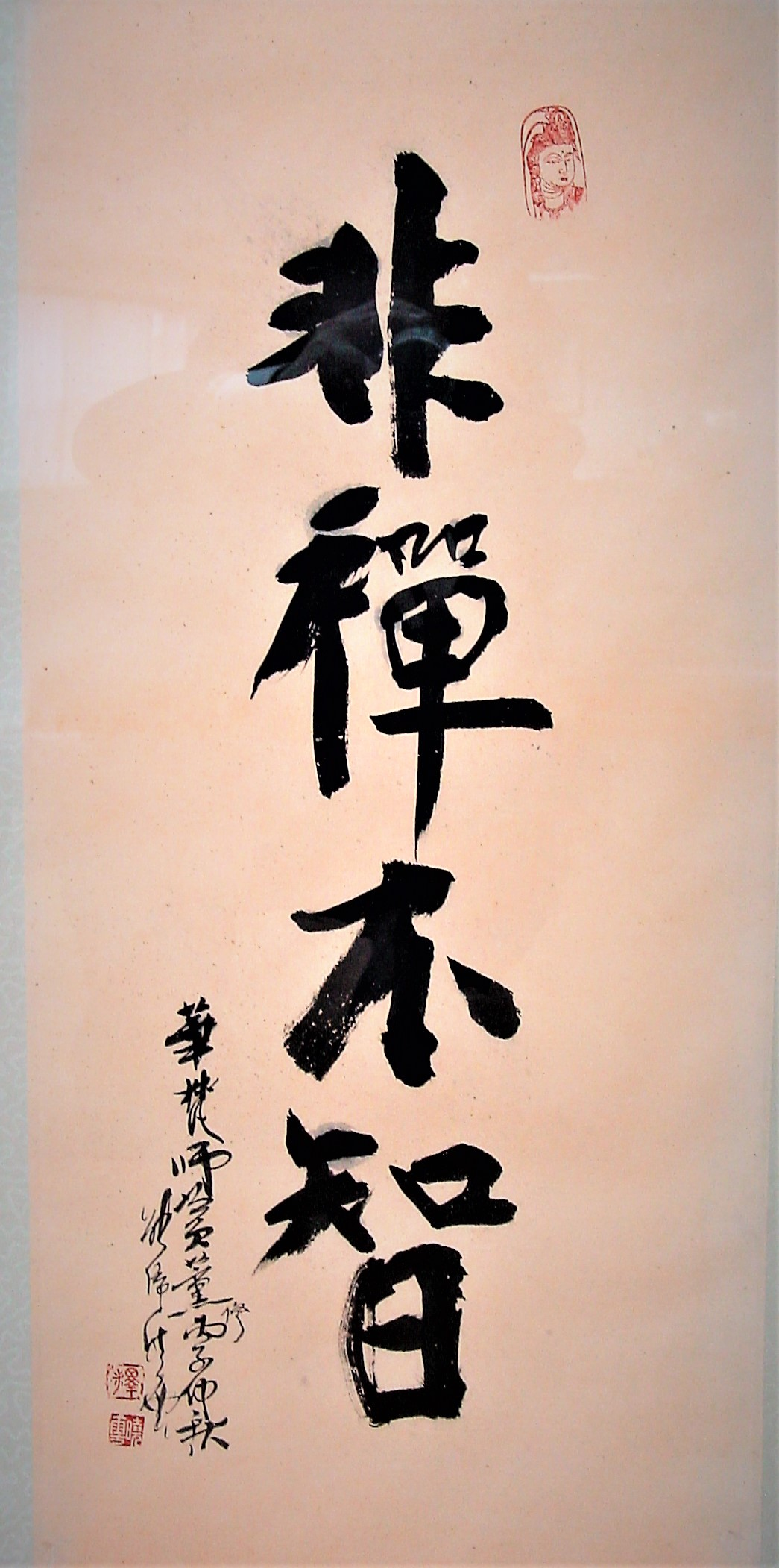 釋曉雲 法師2墨寶